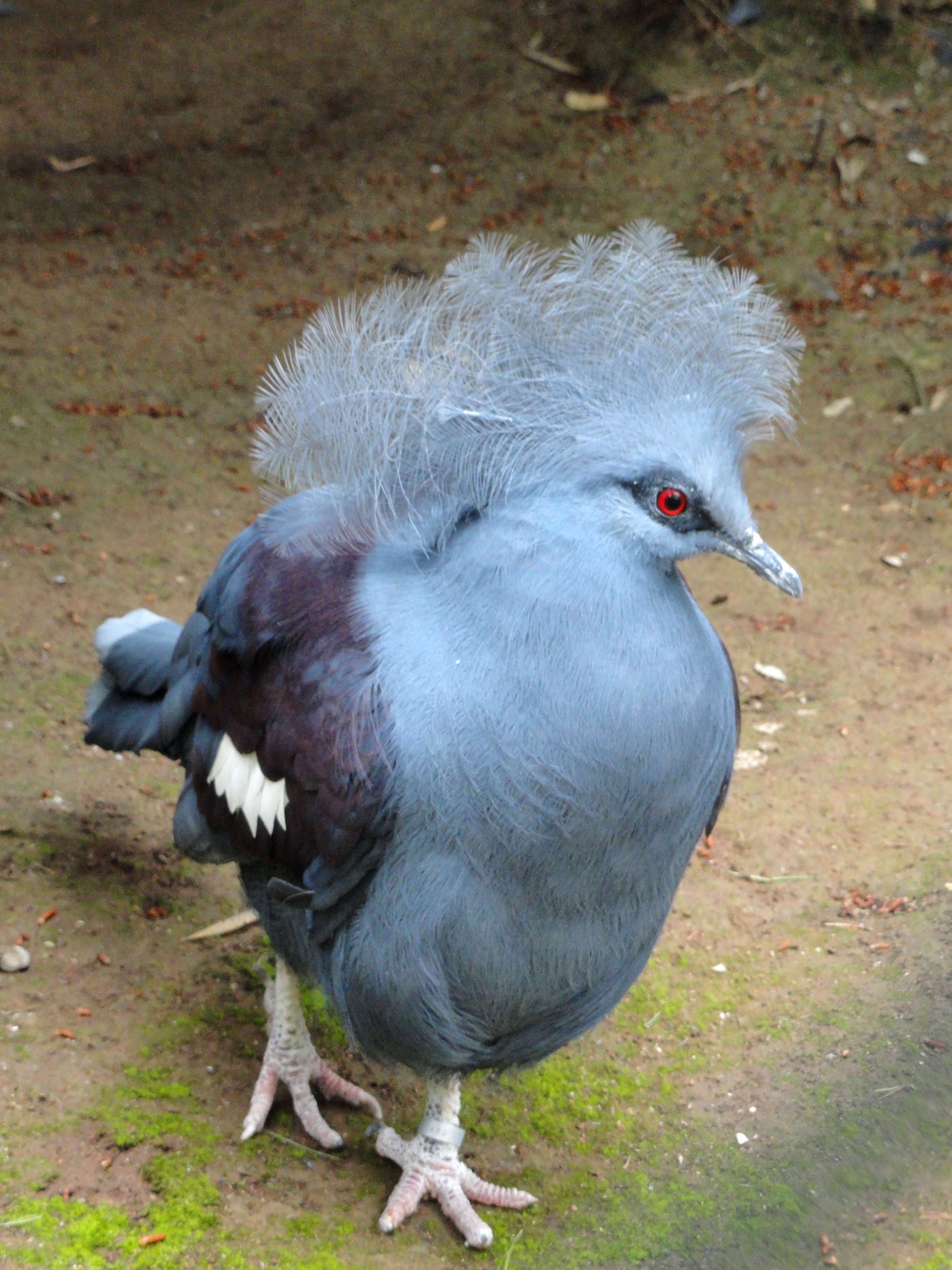 Goura cristata exhibited in the Jardin d'oiseaux tropicaux, La Londe-les-Maures, France.